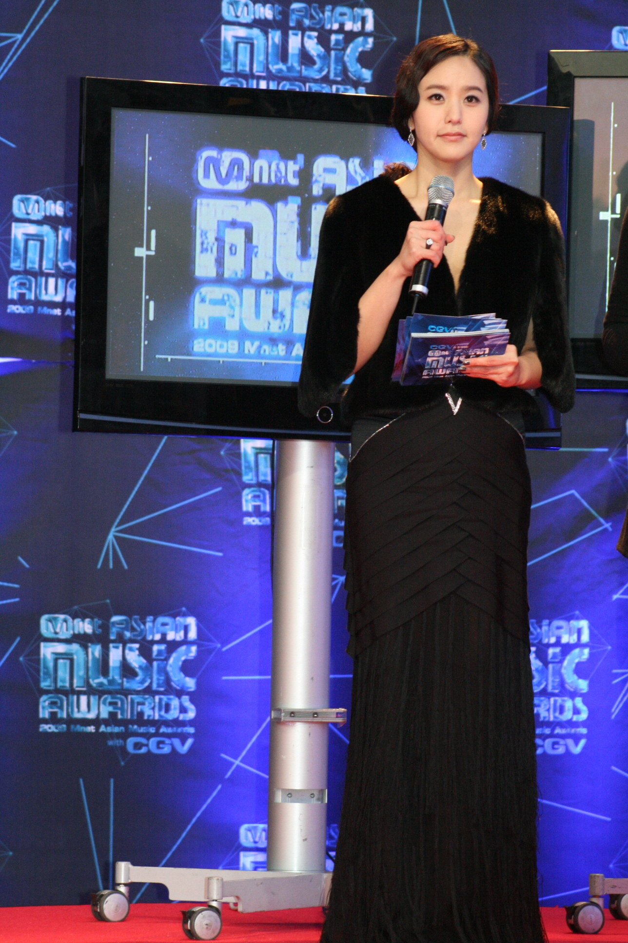 2009 엠넷 아시안 뮤직 어워드